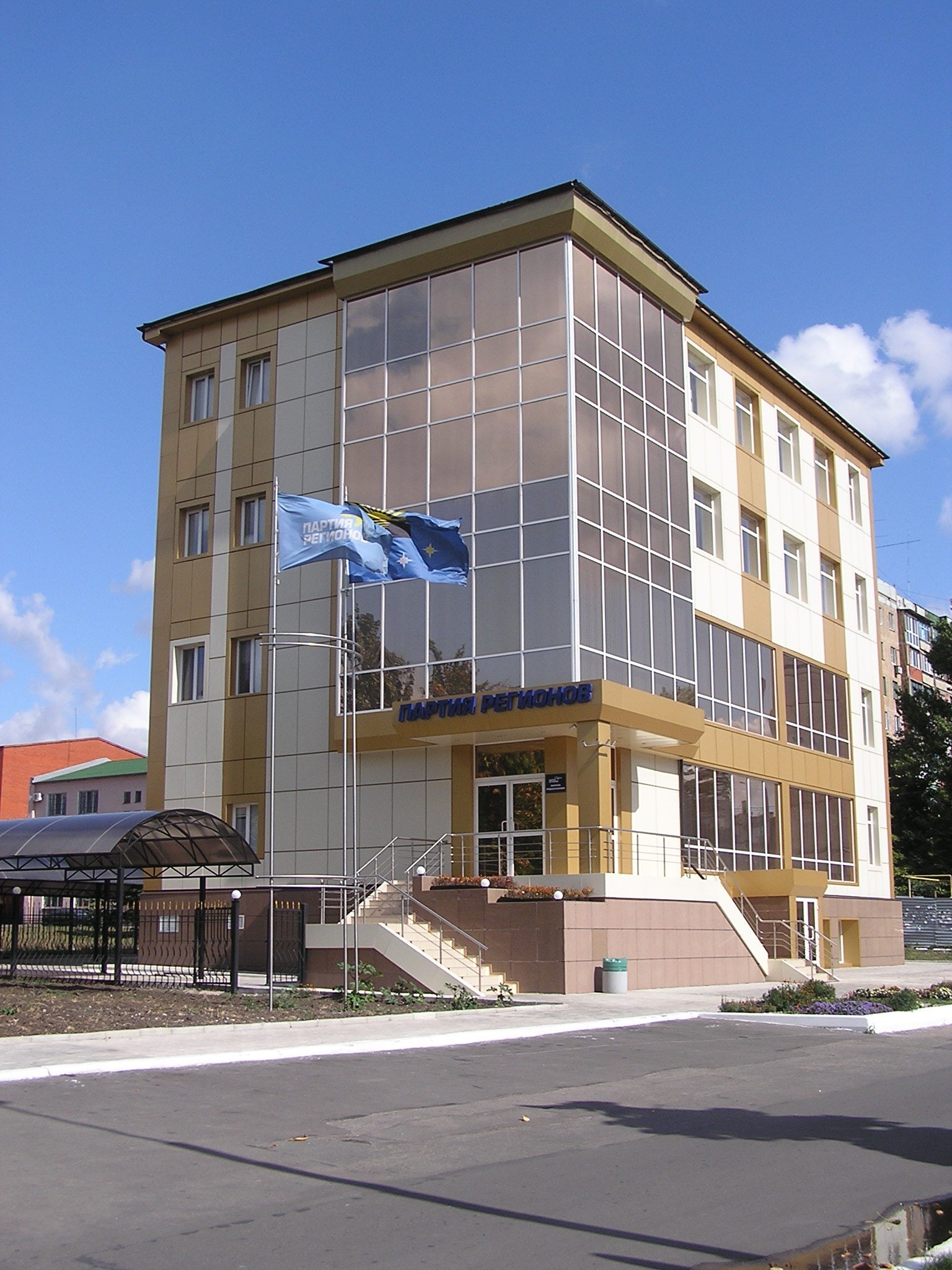 Макеевка